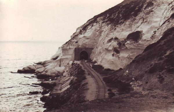 ראש הניקרה, צולמה בטיול משפחתי לצפון.